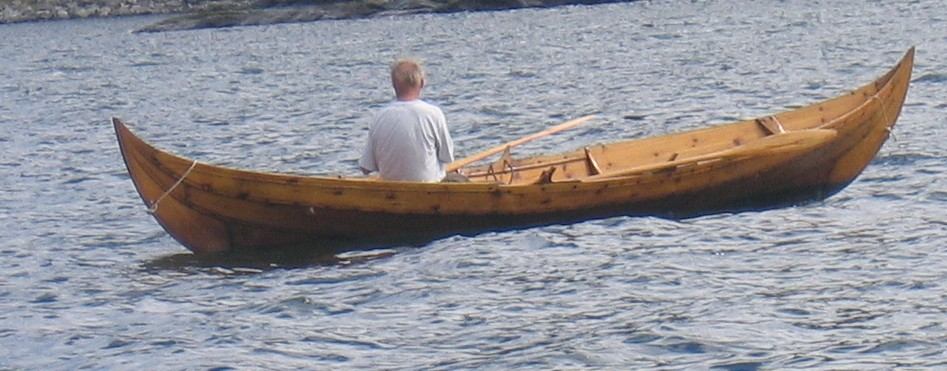 Kopi av Gokstadfæringen fotografert på landsemnet til forbundet Kysten 2008